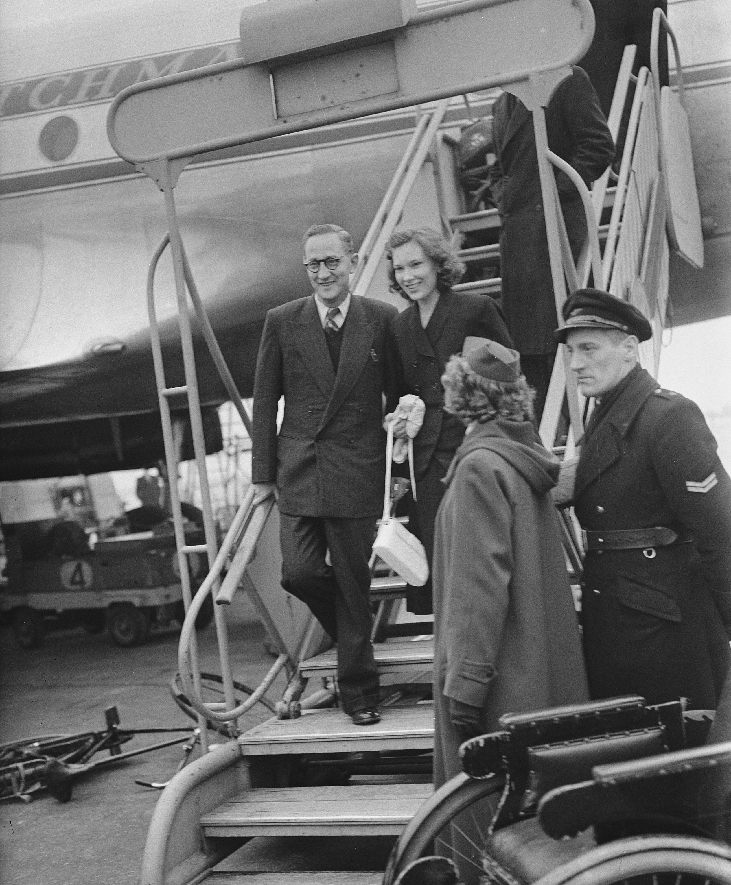 Collectie / Archief : Fotocollectie Anefo Reportage / Serie : [ onbekend ] Beschrijving : Journalist Evenhuis uit Indie op Schiphol met familie Datum : 21 februari 1954 Locatie : Amsterdam, Noord-Holland Trefwoorden : FAMILIES Persoonsnaam : EVENHUIS Fotograaf : Bilsen, Joop van / Anefo Auteursrechthebbende : Nationaal Archief Materiaalsoort : Glasnegatief Nummer archiefinventaris : bekijk toegang 2.24.01.09 Bestanddeelnummer : 906-3070